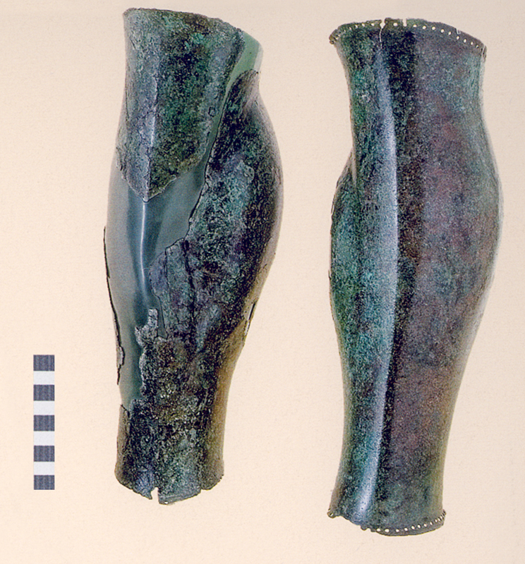 Coppia di schinieri in robusta lamina di bronzo con resa anatomica del muscolo del polpaccio. Lungo i bordi in successione lineare, piccoli fori per affrancare l'imbottitura.